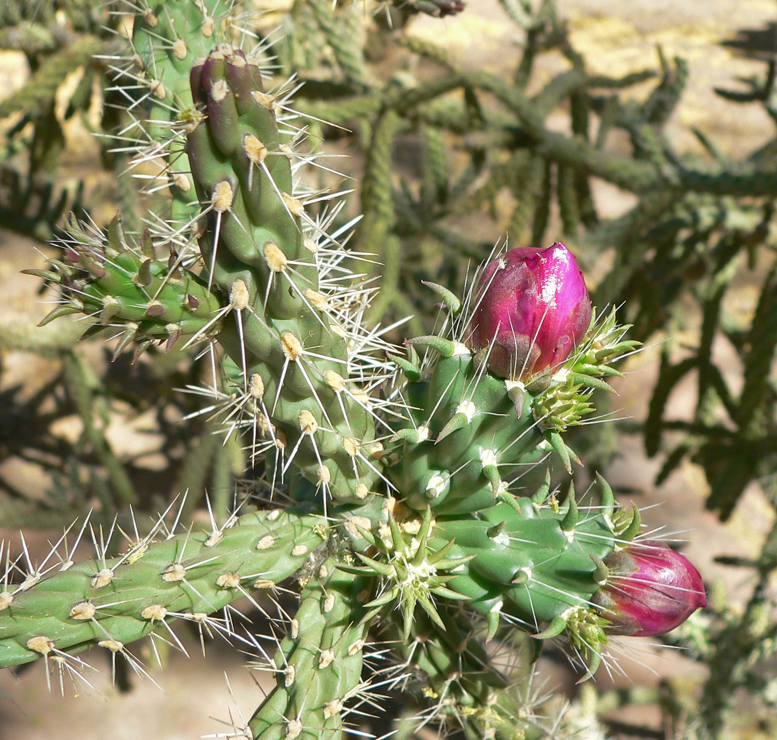 Cylindropuntia fulgida var. fulgida at the Ethel M Botanical Cactus Garden, Las Vegas, Nevada